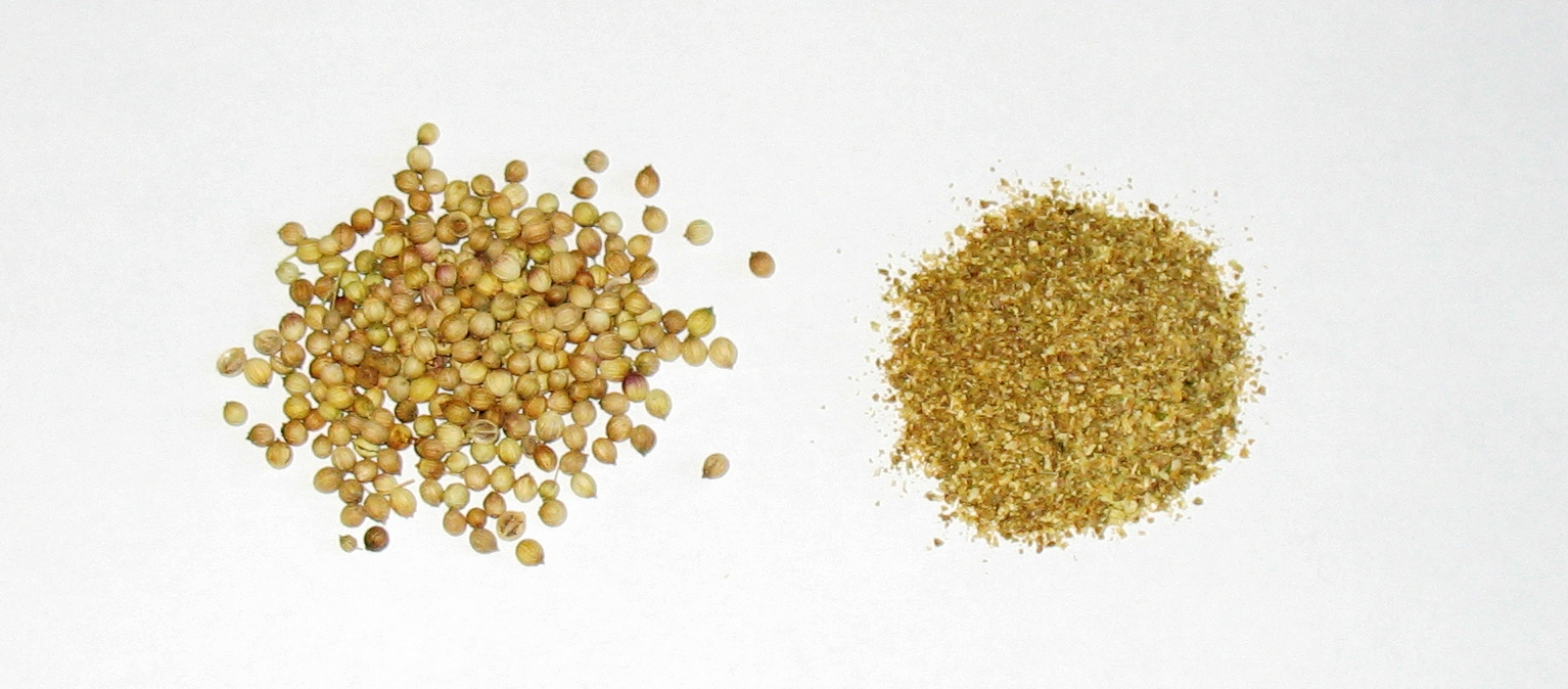 ganzer und gemahlener "Echter Koriander" Kurdî: Kuzberên tûmi û hûrkirî